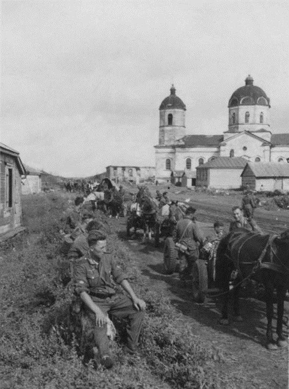 Село Большие Салы в период нацистской оккупации. Справа возвышается армянская церковь Сурб Аствацацин Пресвятой Богородицы